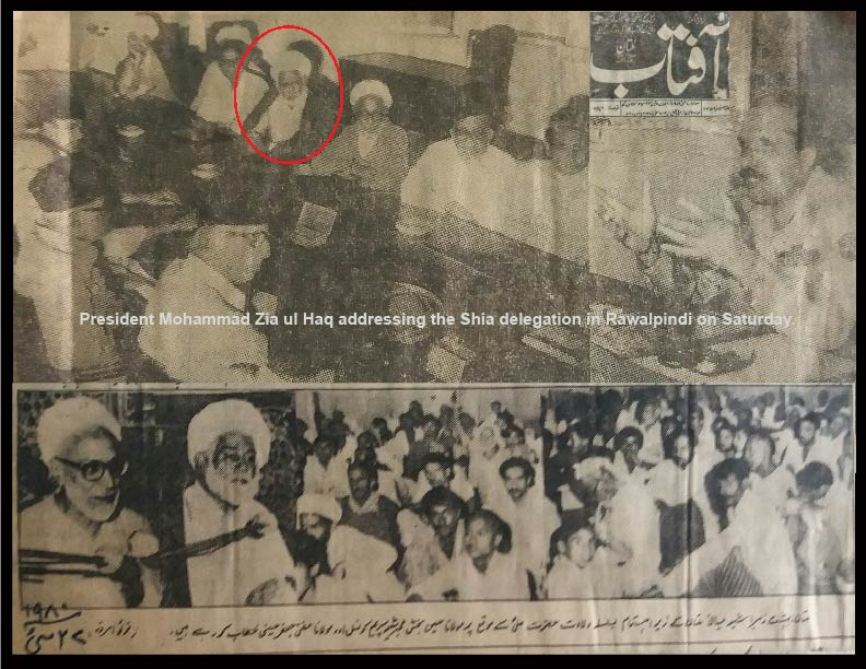 صدر جنرل ضیاء الحق ہفتہ کے روز راولپنڈی میں شیعہ وفد کے ارکان سے خطاب کر رہے ہیں (رونامہ آفتاب مئی 1979) ، ملتان بہشت زہرا شیعہ میانی کے زیر اہتمام بسلسلہ ولادت حضرت علیؑ کے موقعہ پر مولانا حسین بخش ممبر شیعہ سپریم کونسل اور مولانا مفتی جعفر حسین خطاب کر رہے ہیں۔